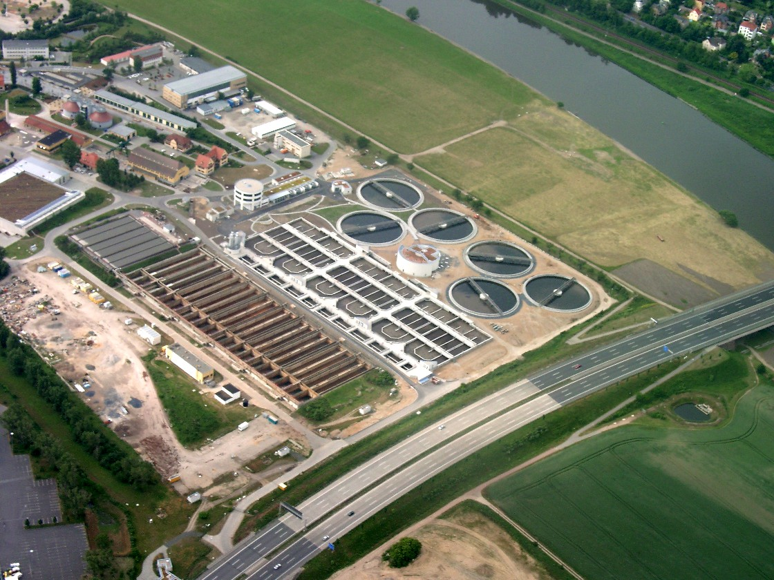 Luftbild der Kläranlage Dresden-Kaditz an der A 4